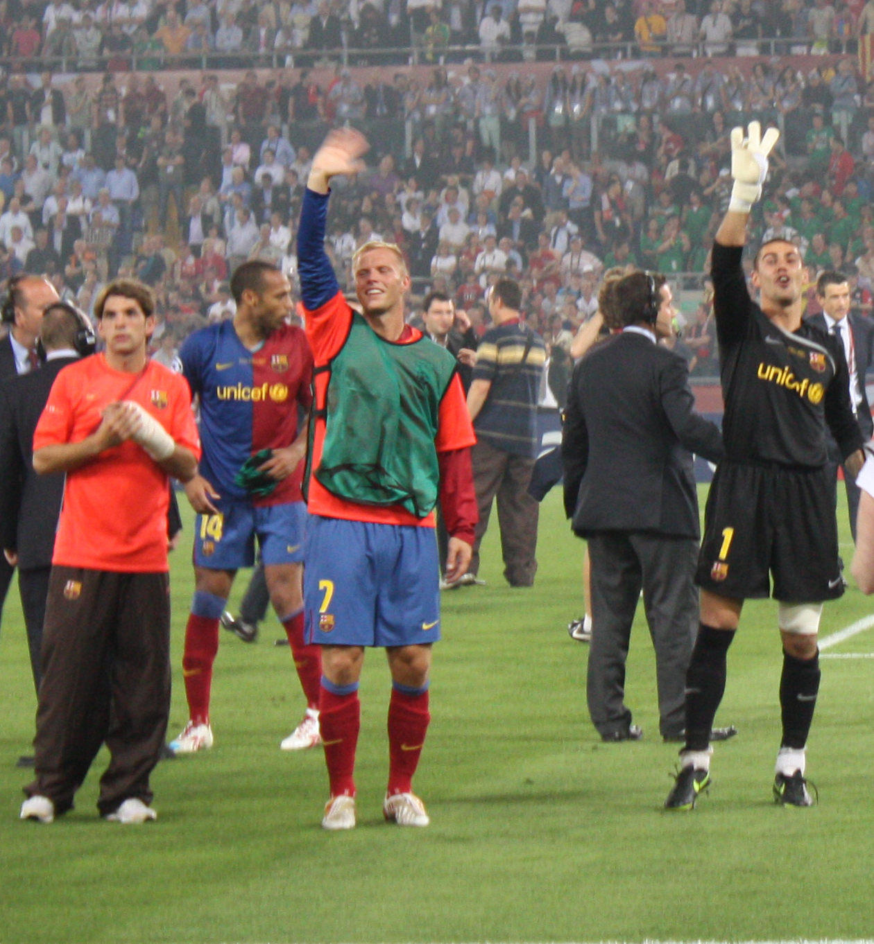 Víctor Vázquez, Guðjohnsen, Thierry Henry i Víctor Valdés en la final de la Champions